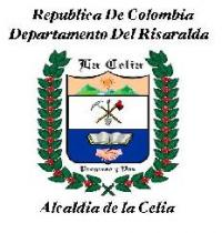 escudo la celia